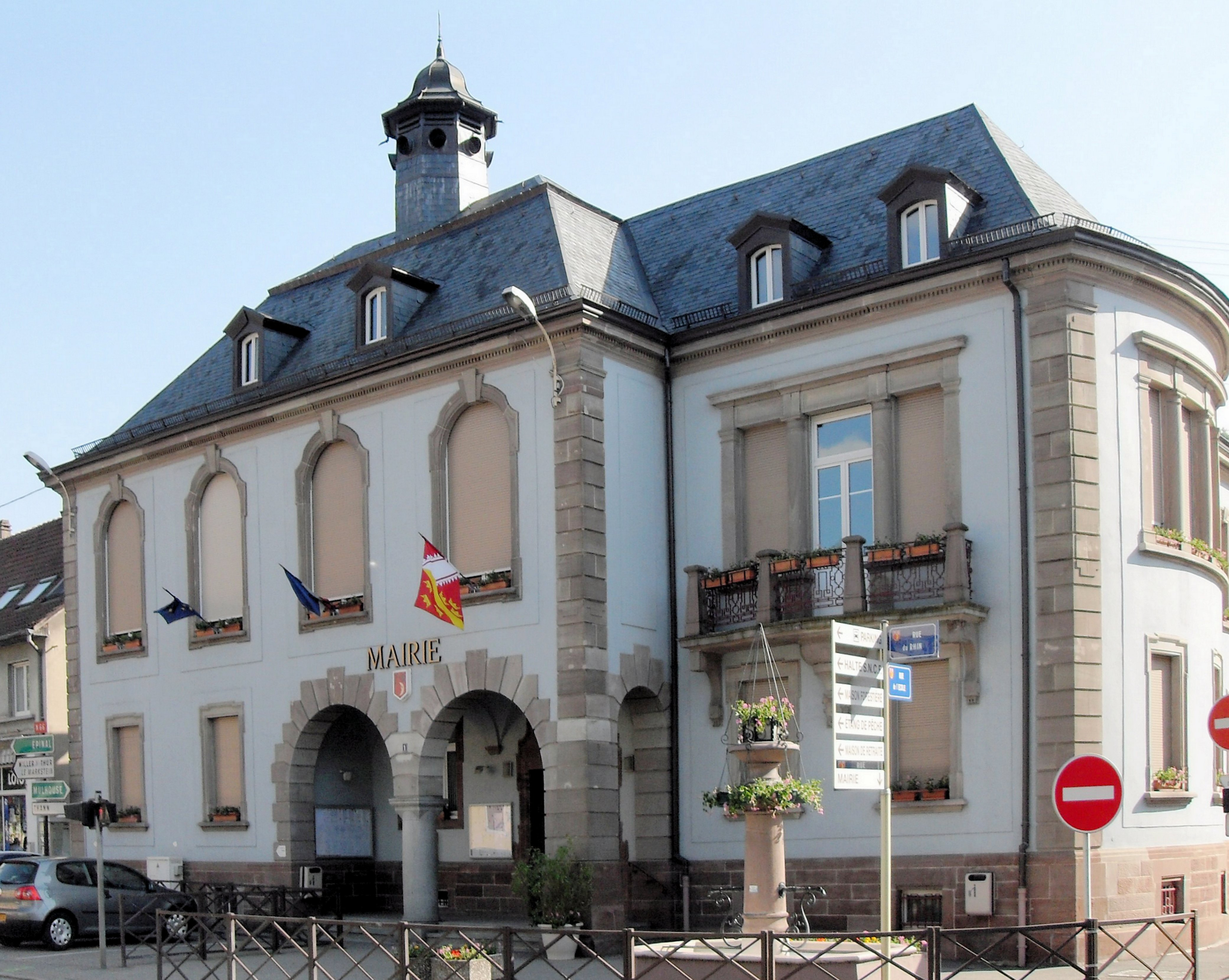 La mairie de Bitschwiller-lès-Thann